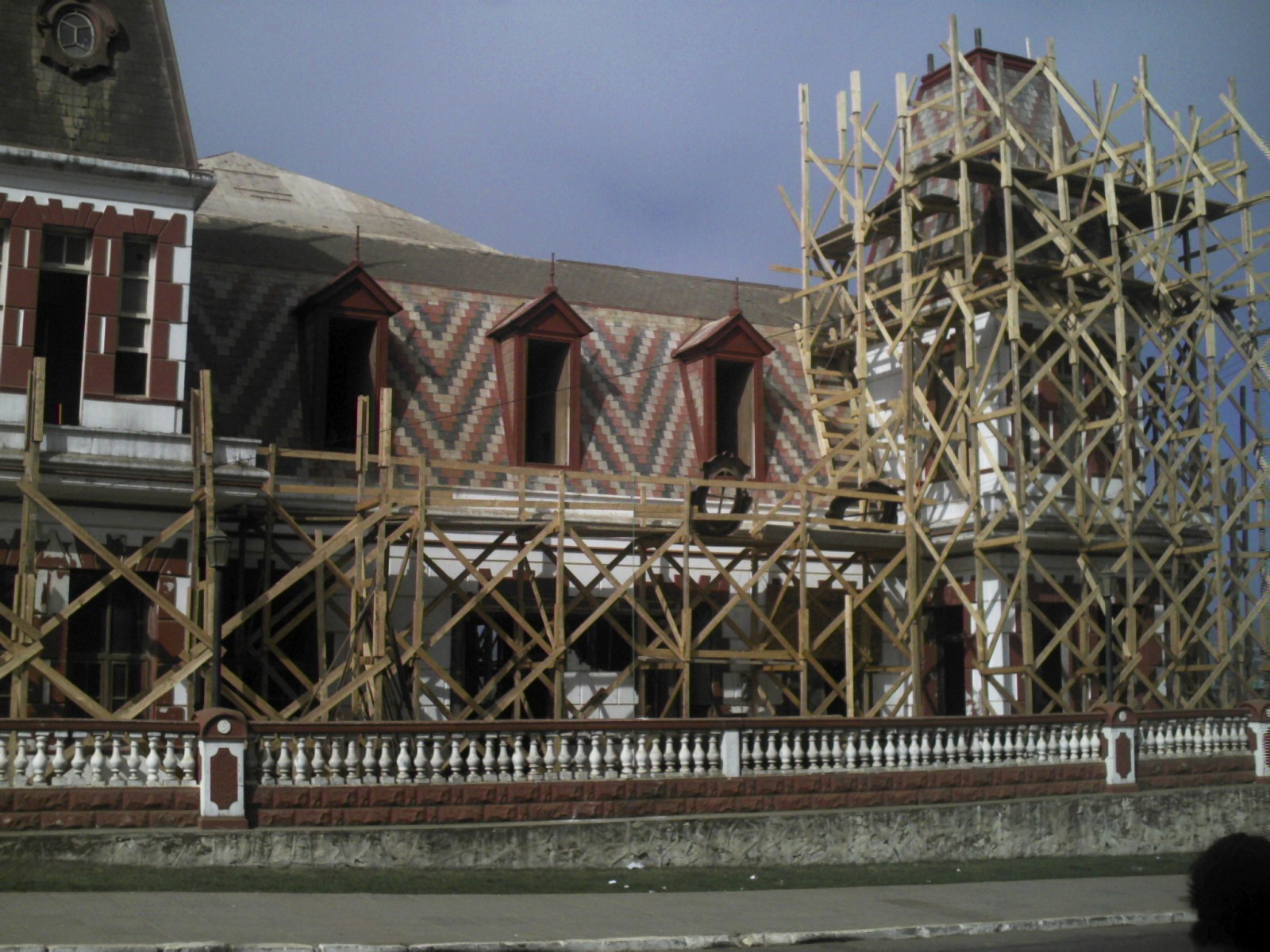 Casino de Pichilemu